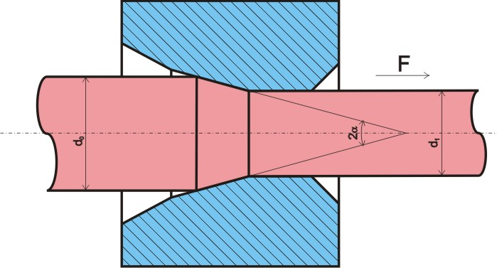 wire drawing